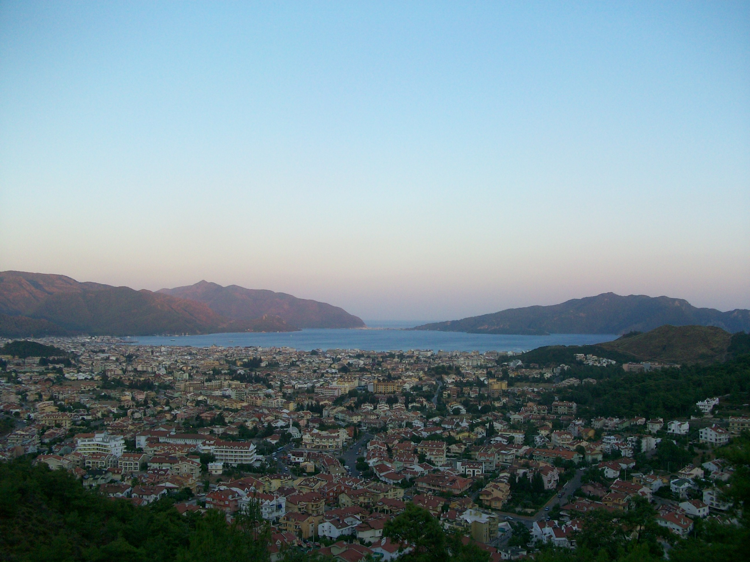 Marmaris'in kuş bakışı görünümü ve bina yığınları.